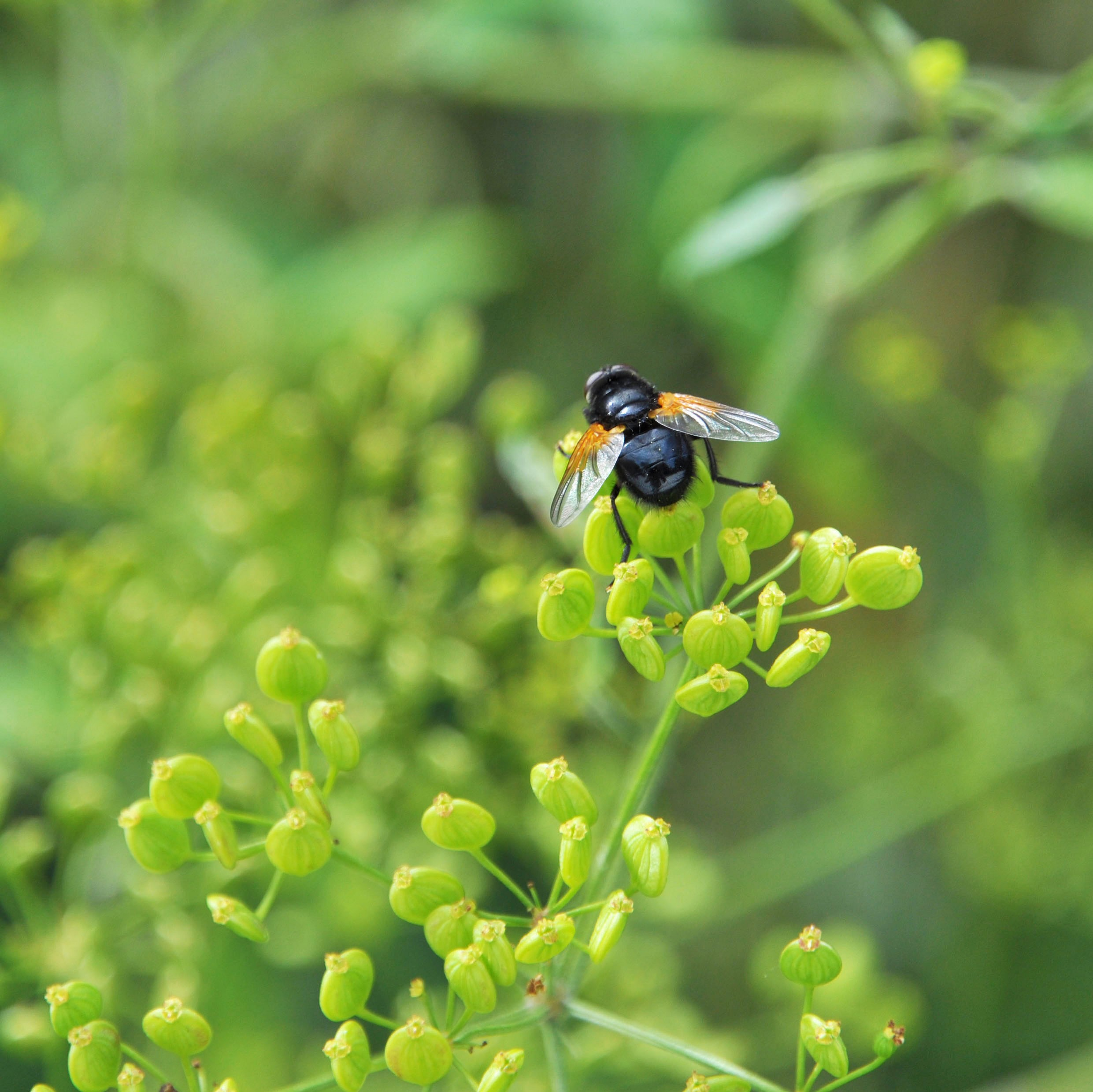 La Mésembrine du midi se chauffe souvent au soleil, posé sur les plantes.